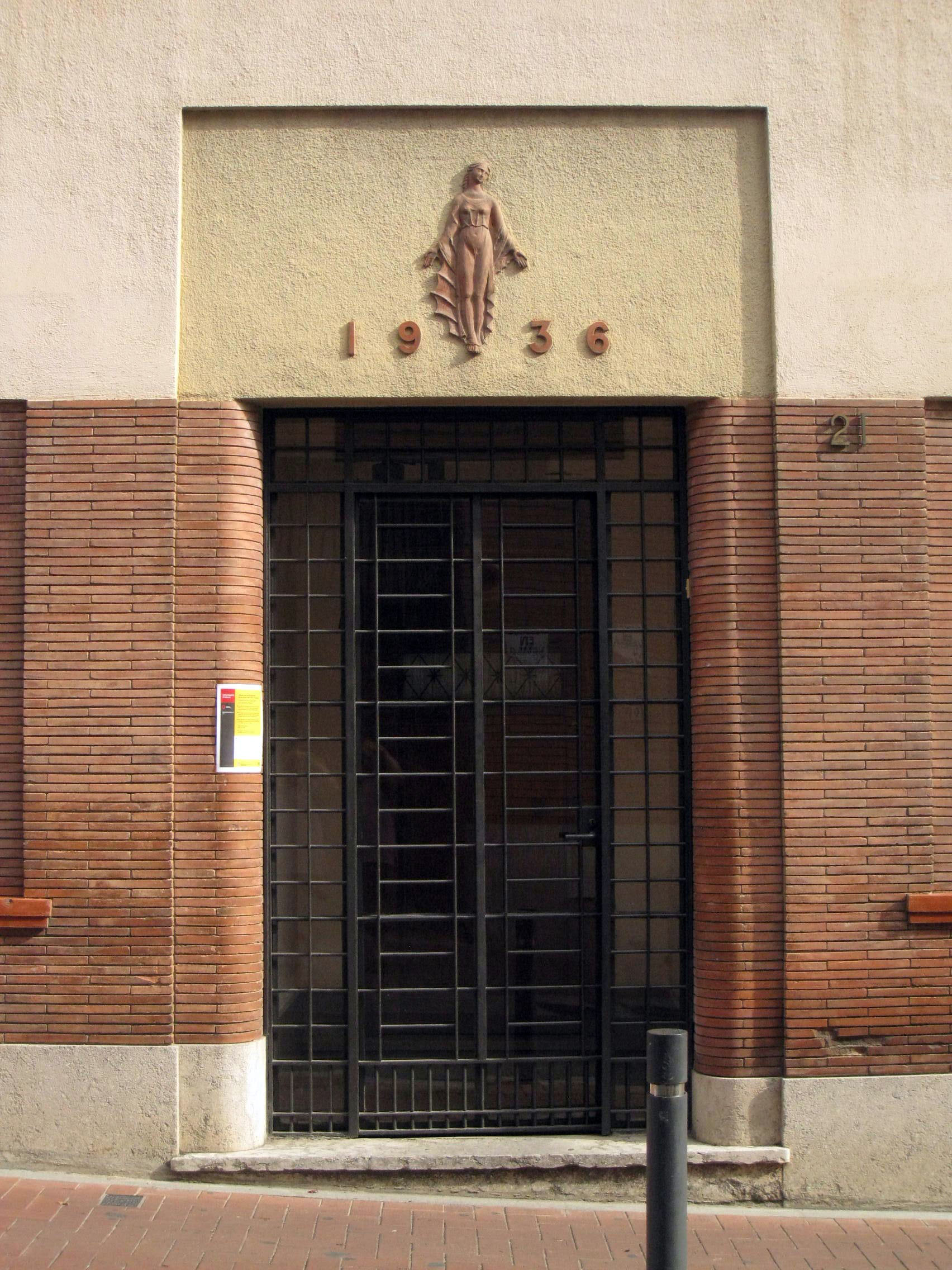 Habitatge unifamiliar al carrer d'Iscle Soler, núm. 21 (Terrassa). Edifici racionalista de Joan Baca (1936).